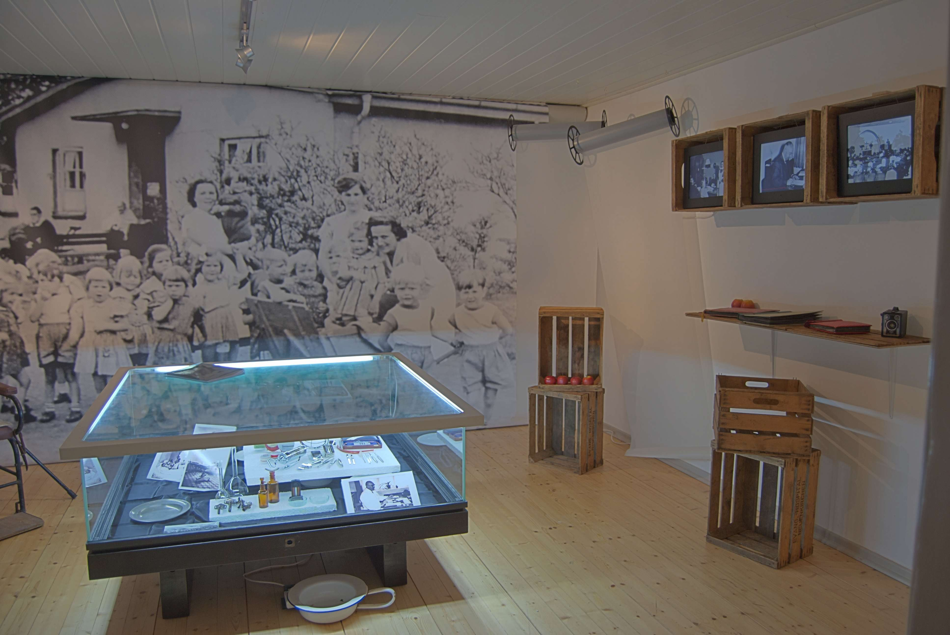 Raum "Evangelisches Hospital Neuenkirchen" in der Gedenkstätte Baracke Wilhelmine in Schwanewede-Neuenkirchen in Niedersachsen/Deutschland.